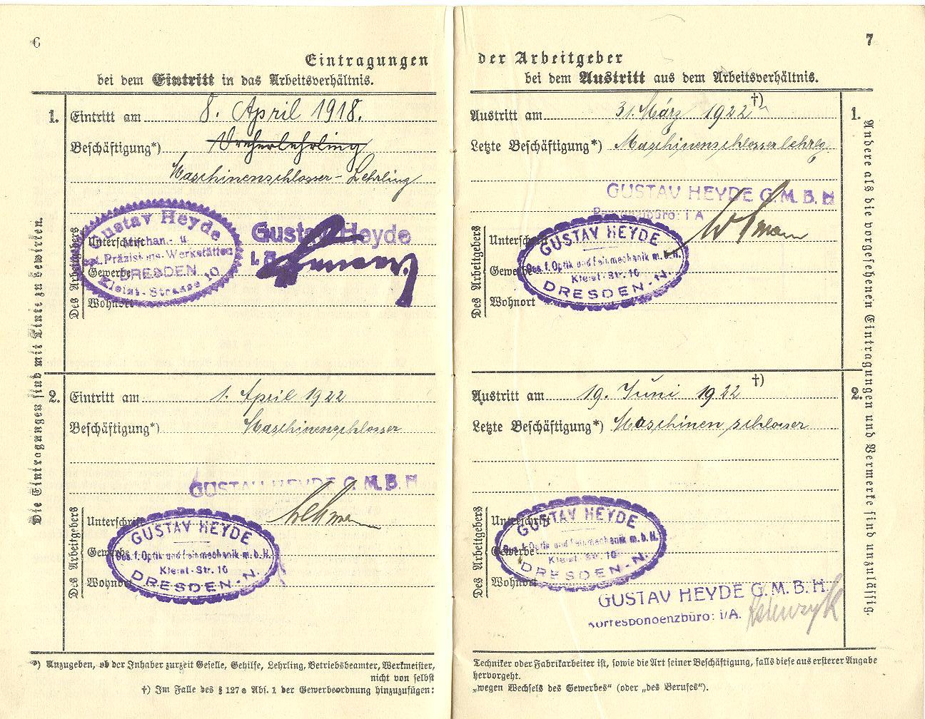 Arbeitsbuch-Eintragungen Deutschland Jahr 1922